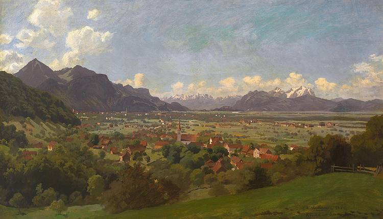 Blick von der Parzelle Knie im Stadtteil Haselstauden auf Dornbirn und das Rheintal mit Säntismassiv, oil on canvas, 46 x 77 cm